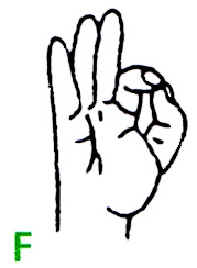 Buchstabe F im deutschen Fingeralphabet, gemäß einer Infokarte der Deutschen Gehörlosenhilfe Bayern e.V